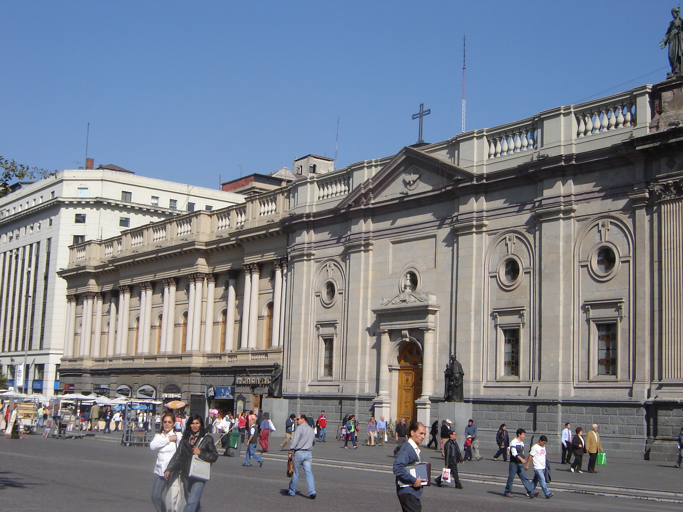 Palacio y Sagrario — Plaza de Armas de Santiago de Chile. La fotografia es trabajo propio del autor del articulo